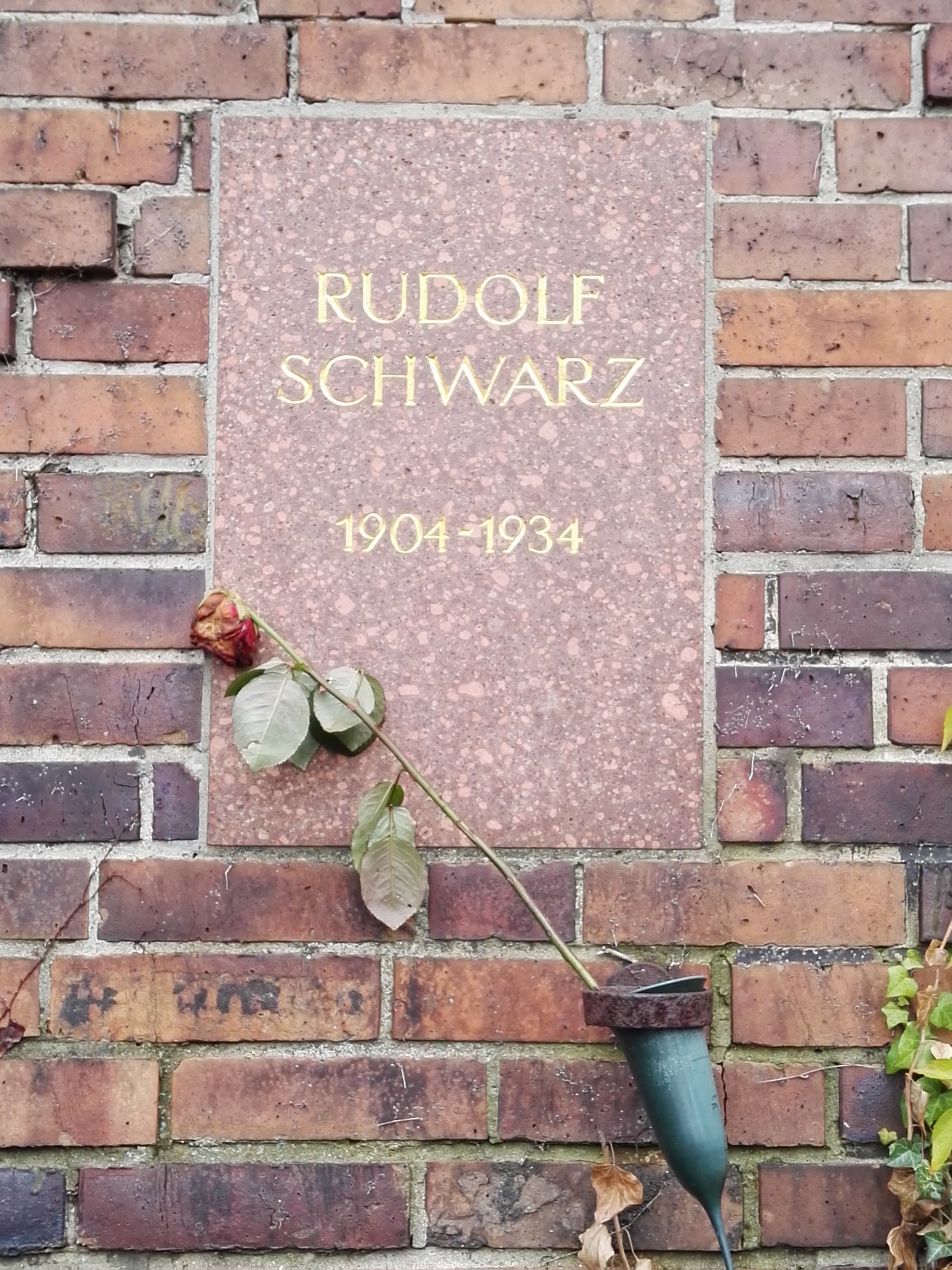 Grab von Rudolf Schwarz in der Gedenkstätte der Sozialisten auf dem Zentralfriedhof Friedrichsfelde in Berlin-Lichtenberg